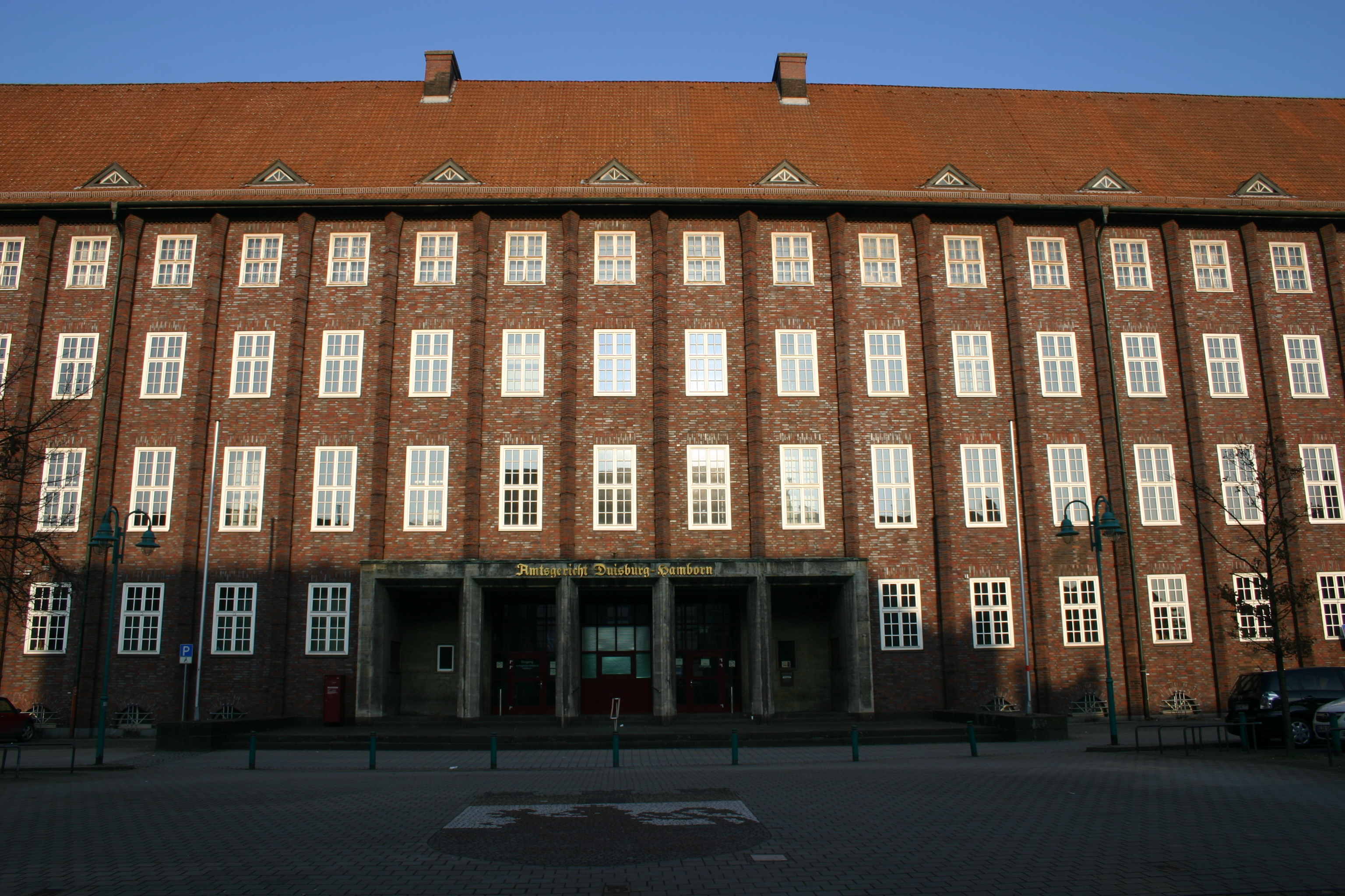 Amtsgericht in Duisburg-Hamborn. (Auf dem Vorplatz ist das Hamborner Wappen zu sehen.) This is a photograph of an architectural monument., no. 0